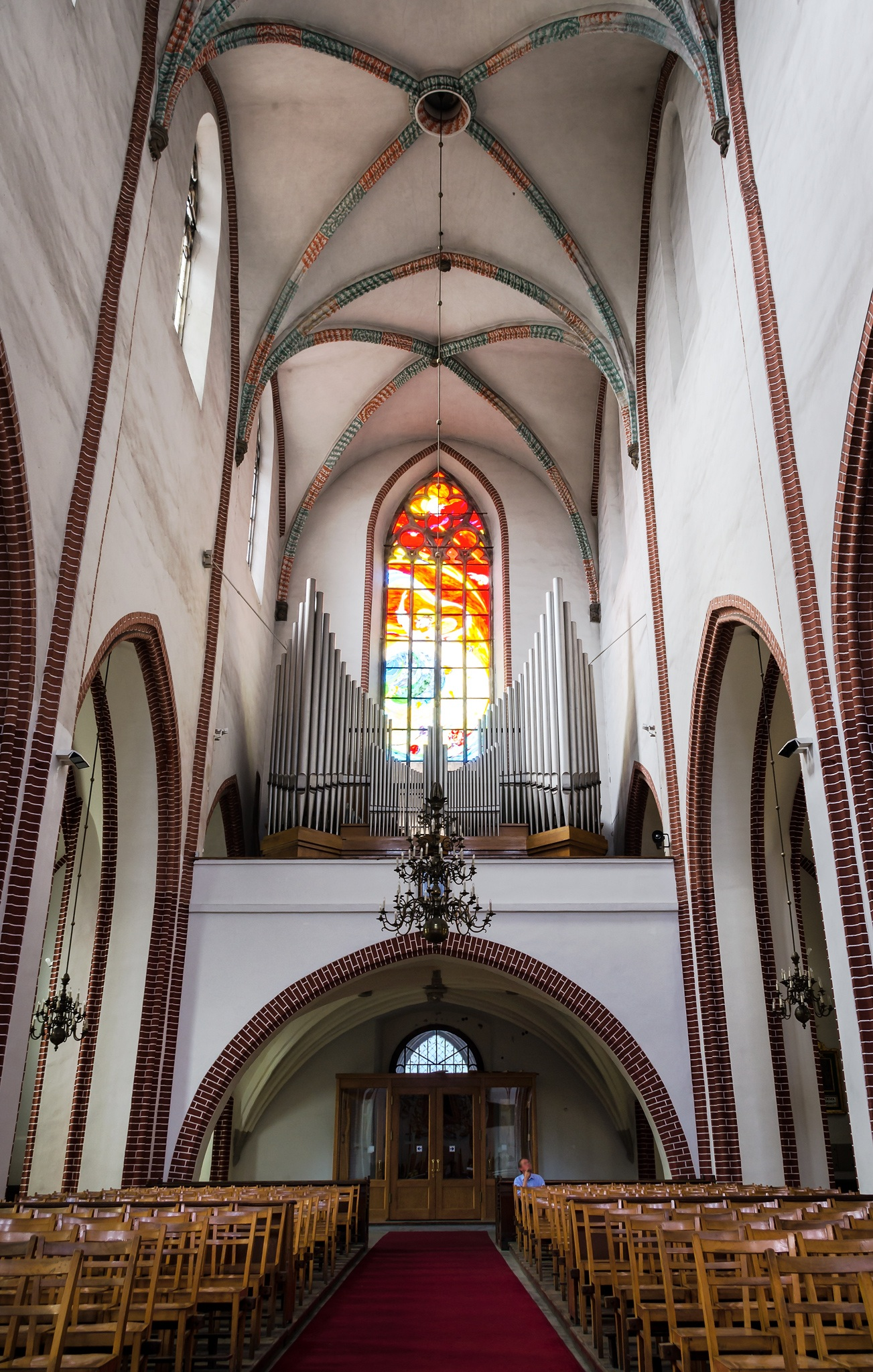 Kościół Bożego Ciała we Wrocławiu - wnętrze, sklepienia łukowe, organy